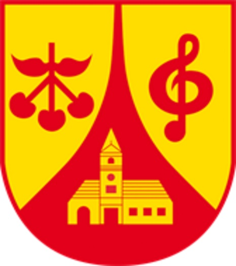 Die Kirche als ältestes Gebäude, der Notenschlüssel für die langjährige Pflege des musikalischen Kulturgutes und die Kirsche als Symbol für den Obstbau und die Landwirtschaft, die in Pöttsching lange Zeit Lebensgrundlage für die ansässigen Leute waren. Peter Zauner, der Komponist der Burgenländischen Landeshymne, stammt aus Pöttsching.